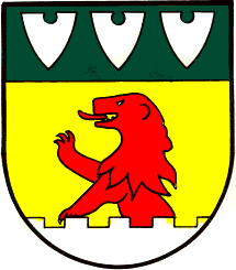 Wappen der Gemeinde Hausmannstätten in Österreich